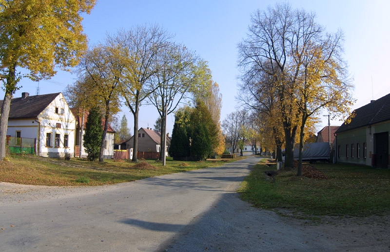 Náves ve Dřevci.